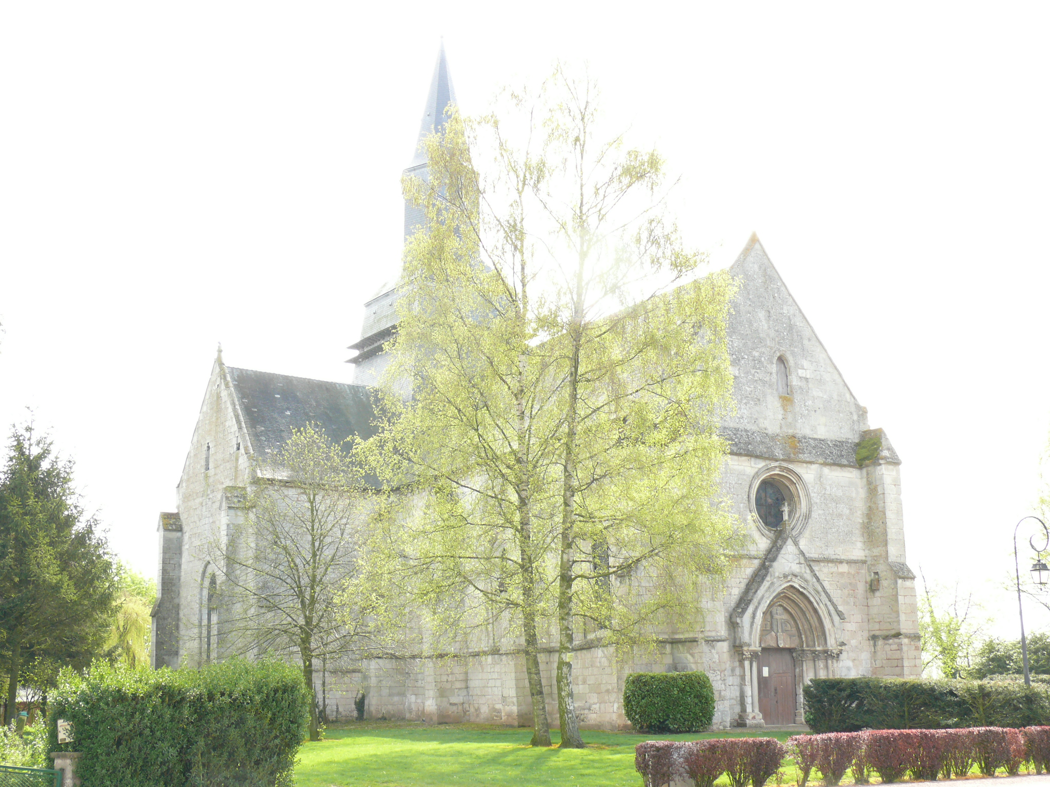 Sommereux (Oise - Picardie - France) : L'église Saint Aubin